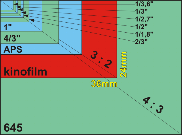 Velikosti CCD